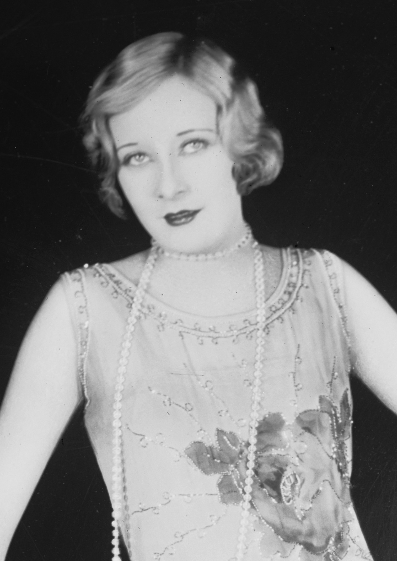 Gwen Lee